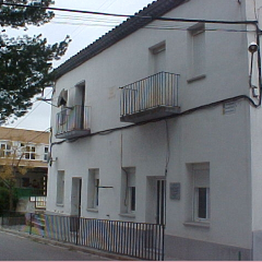 Chi-Chewa: És l'escola Sant Bartomeu de Bellmunt d'Urgell (La Noguera) - Catalunya.